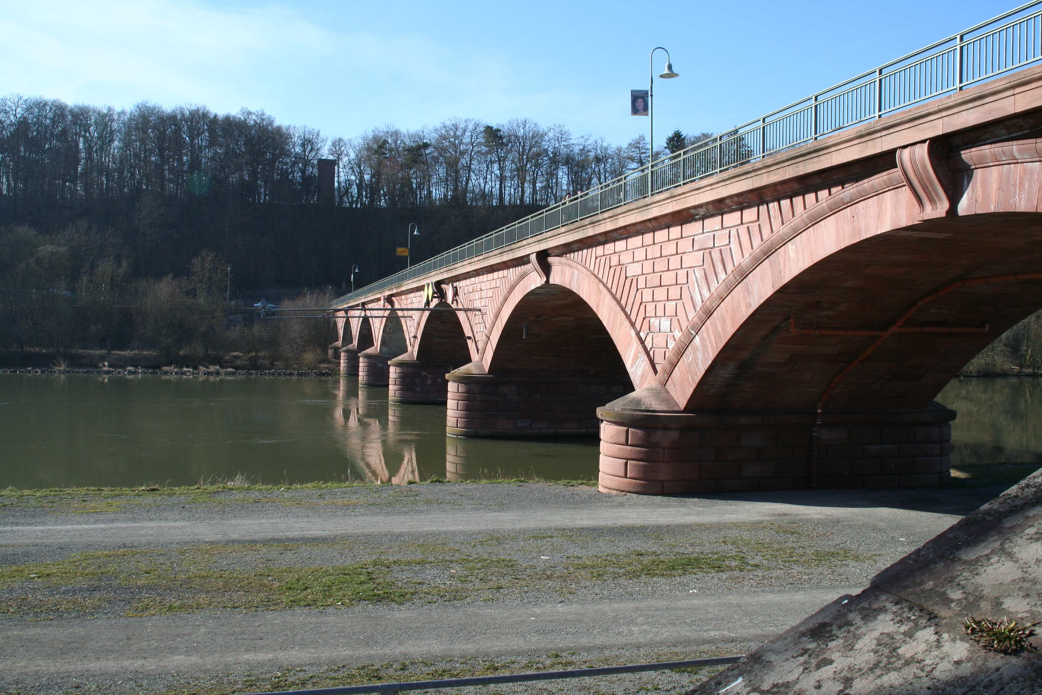 Alte Mainbrücke Marktheidenfeld, Main-Spessart-Kreis, in Unterfranken